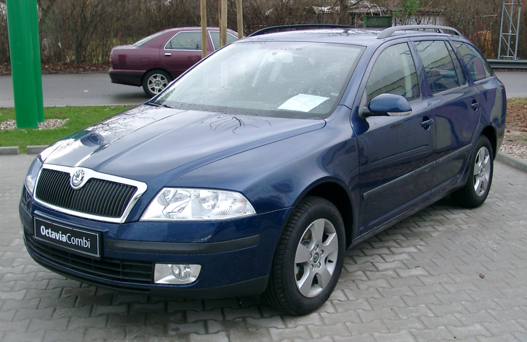 Škoda Octavia Combi, 2. Generation